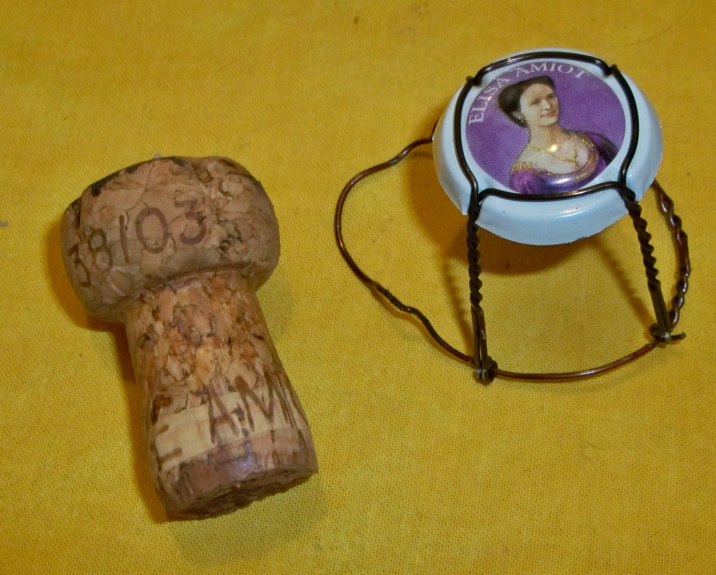 Bouchon type champagne, et sont attache